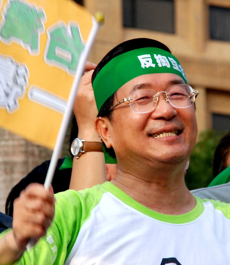 2008年10月25日台灣大遊行中出現的陳水扁。